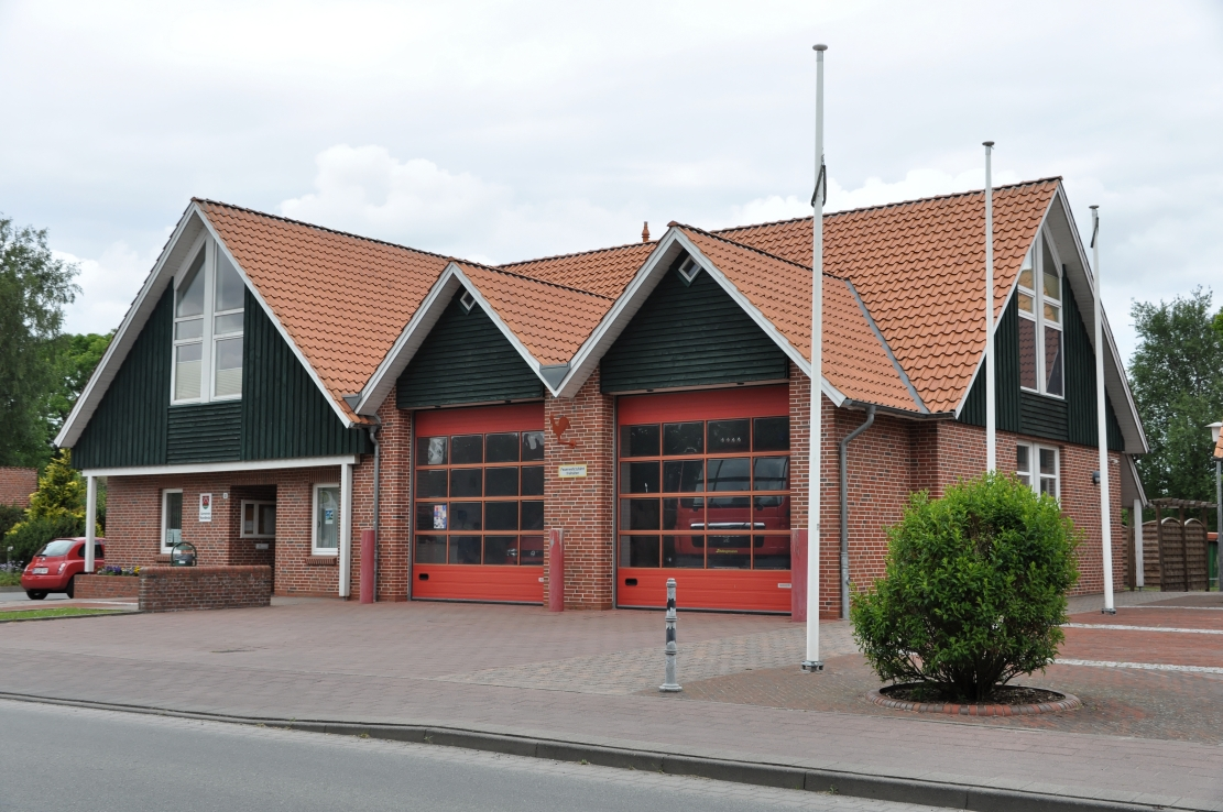 Bilder Nordleda 2012 05